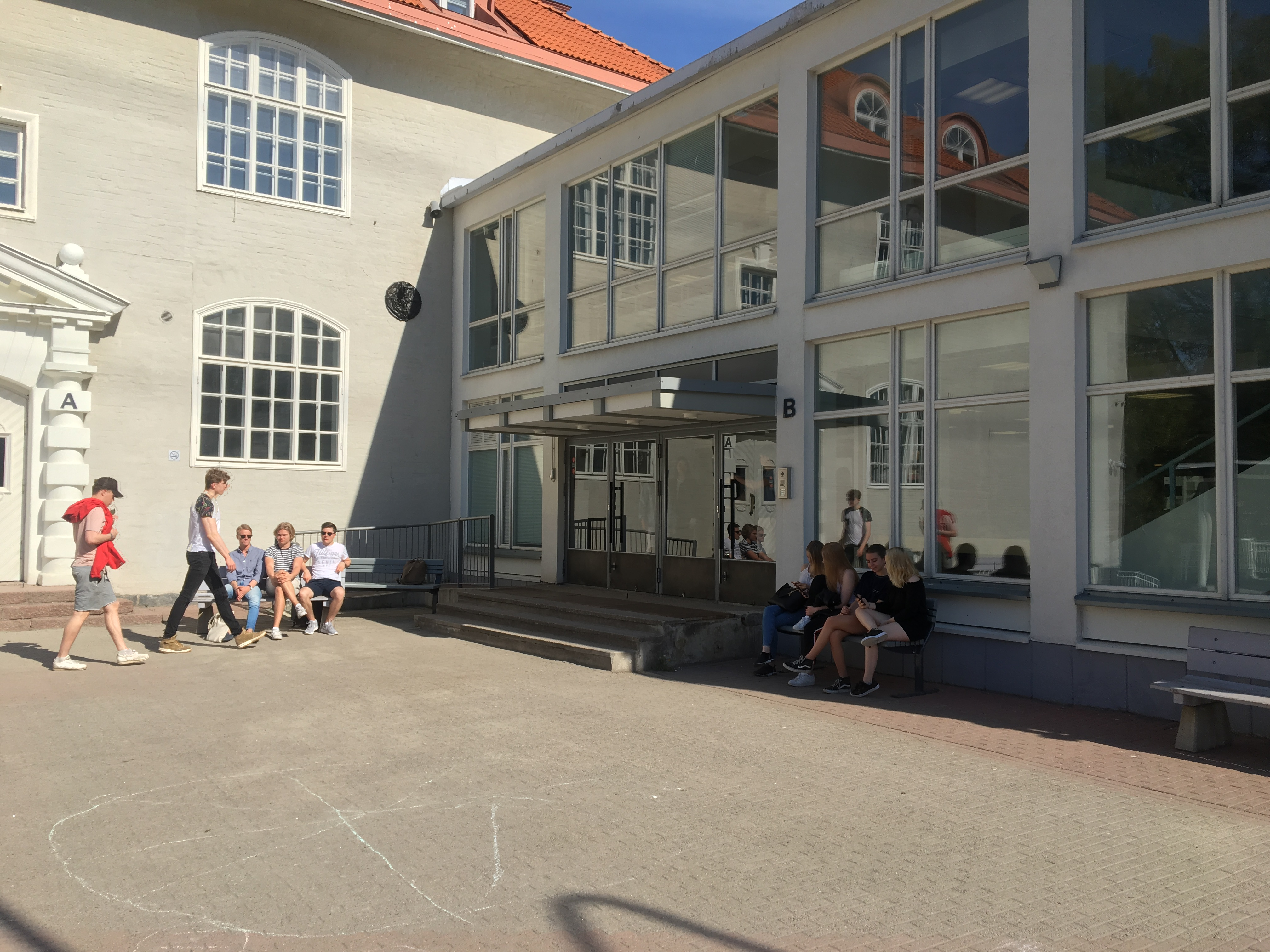 Innergården vid Brändö gymnasium